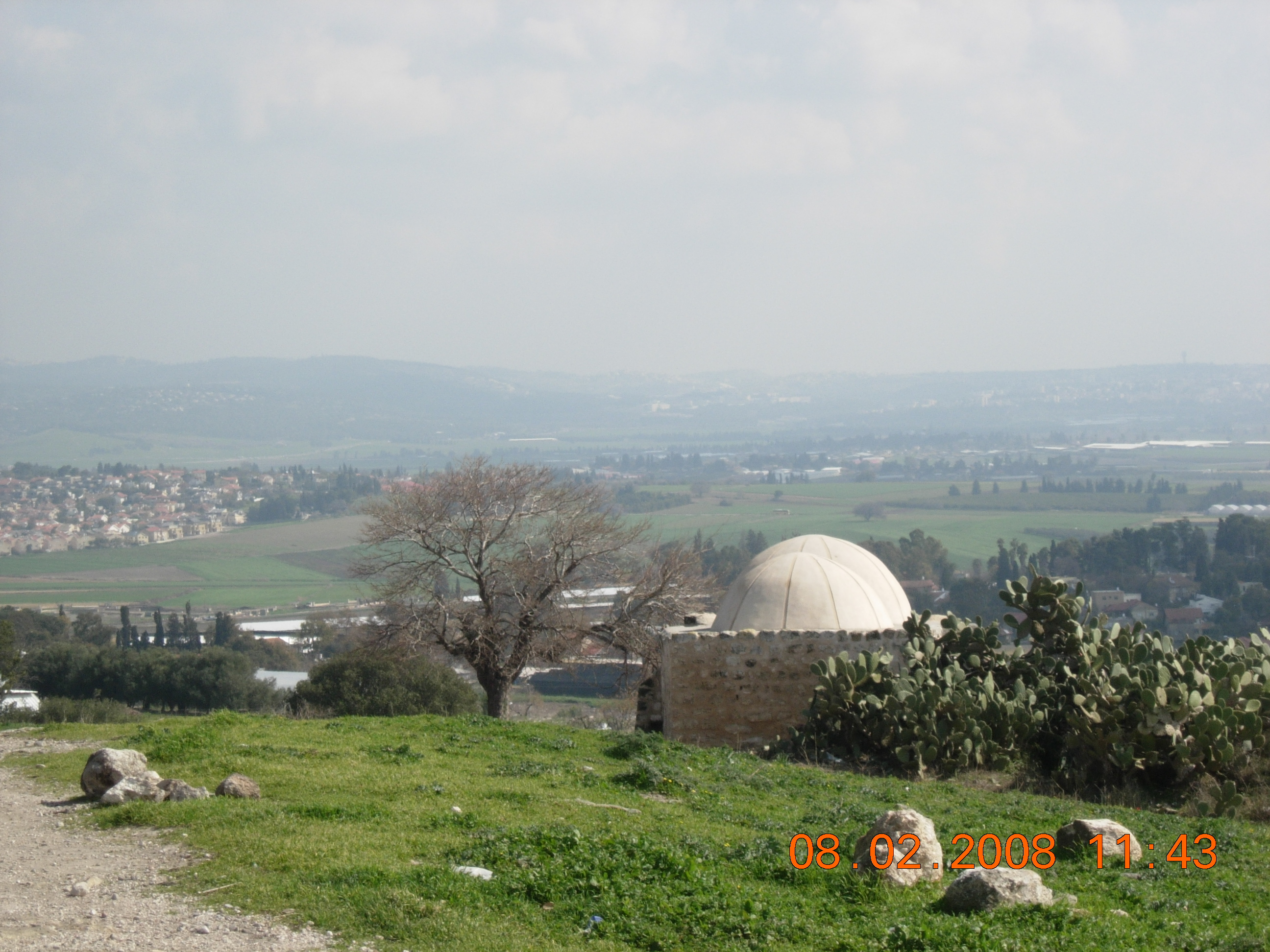 Zaid12